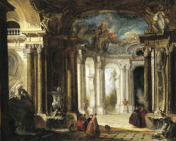 Jacques de Lajoue. The interior of a Baroque palace with elegant company conversing by fountains